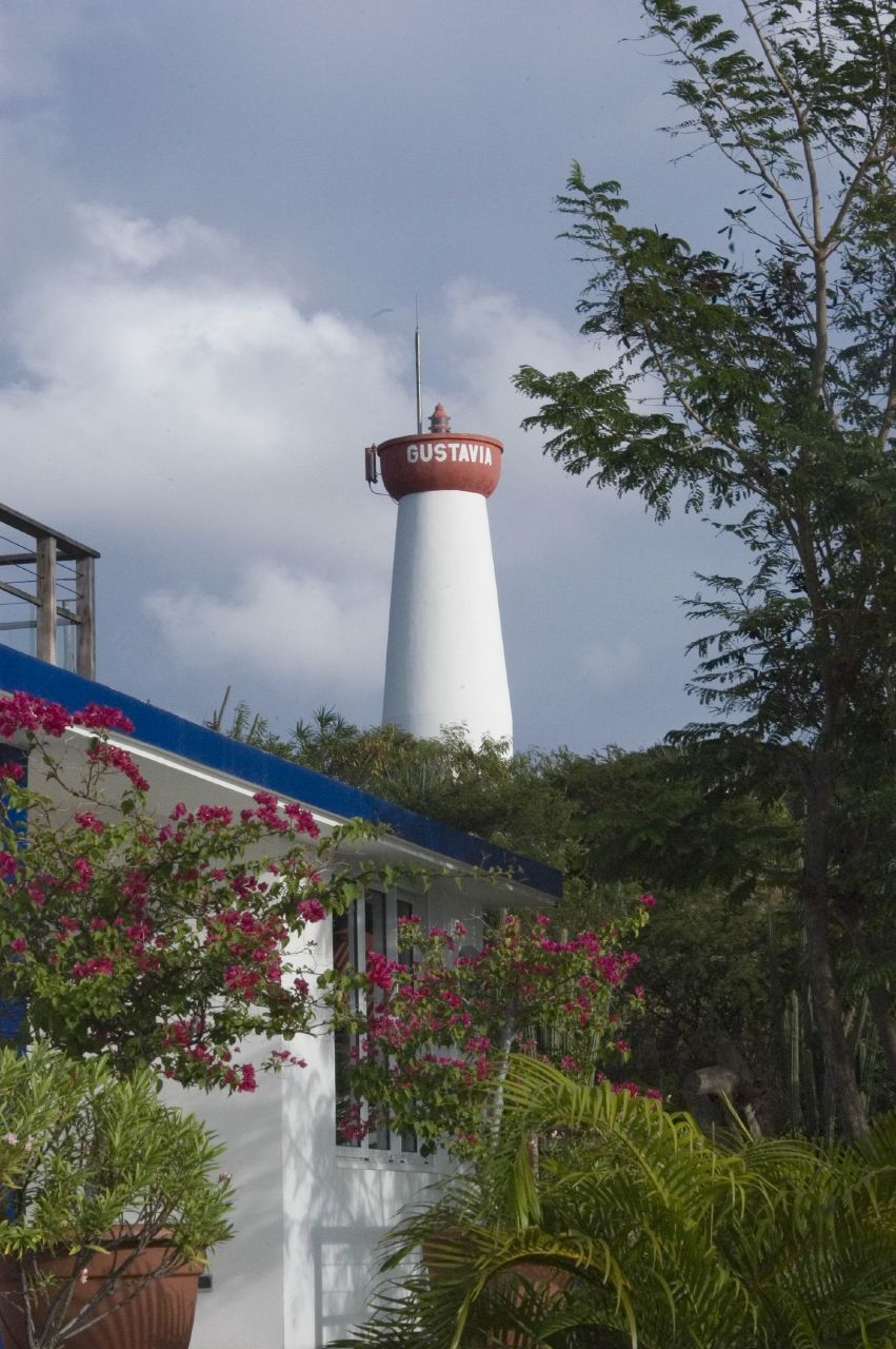 Phare de Gustavia (Saint-Barth)